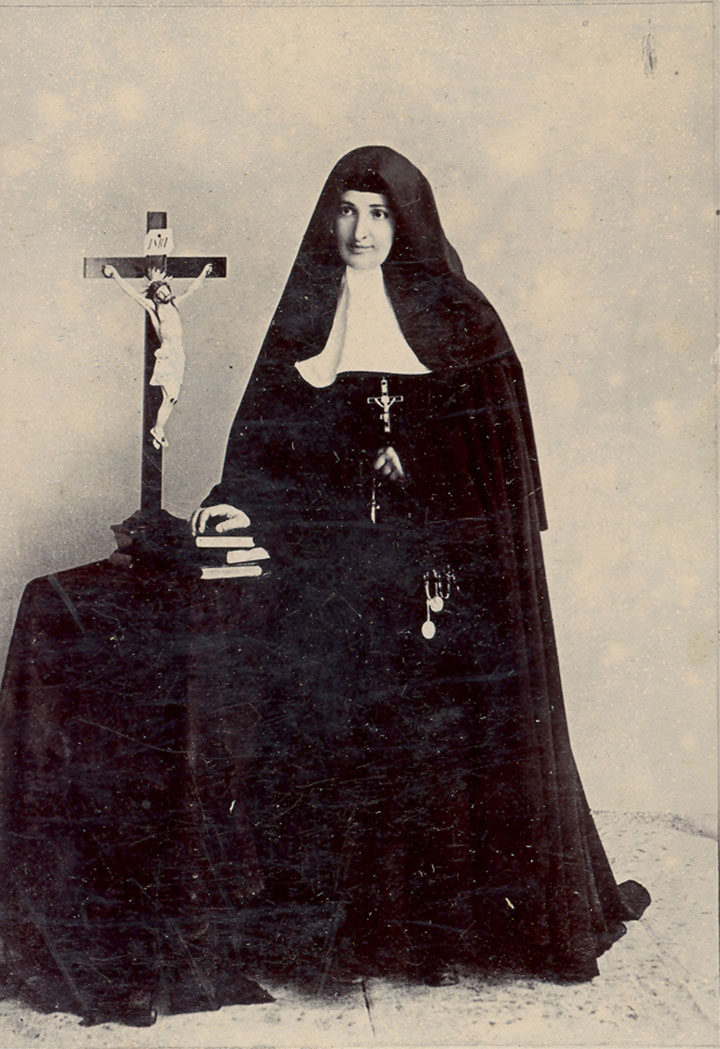 Bertilda Samper Acosta, conocida como la Madre María Ignacia, hermana de La Enseñanza y co-autora de la Novena de Aguinaldos